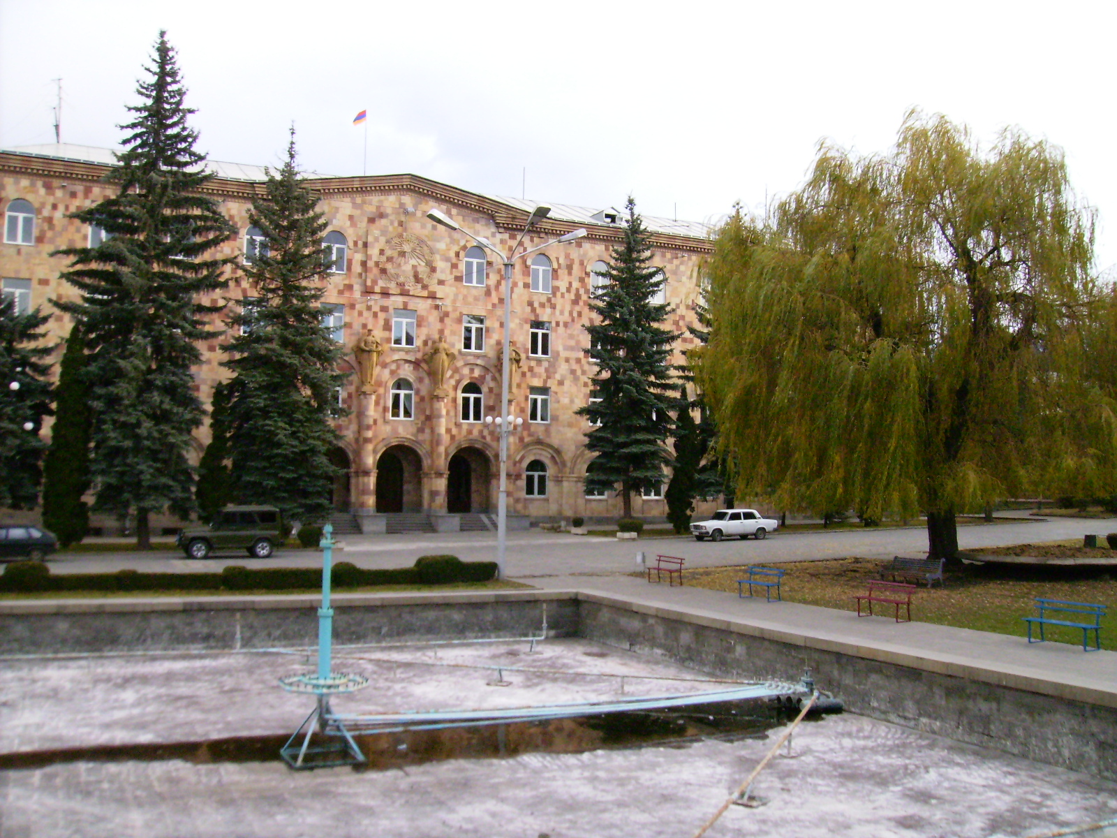 Վանաձորի քաղաքապետարանի շենքը 1/36.2